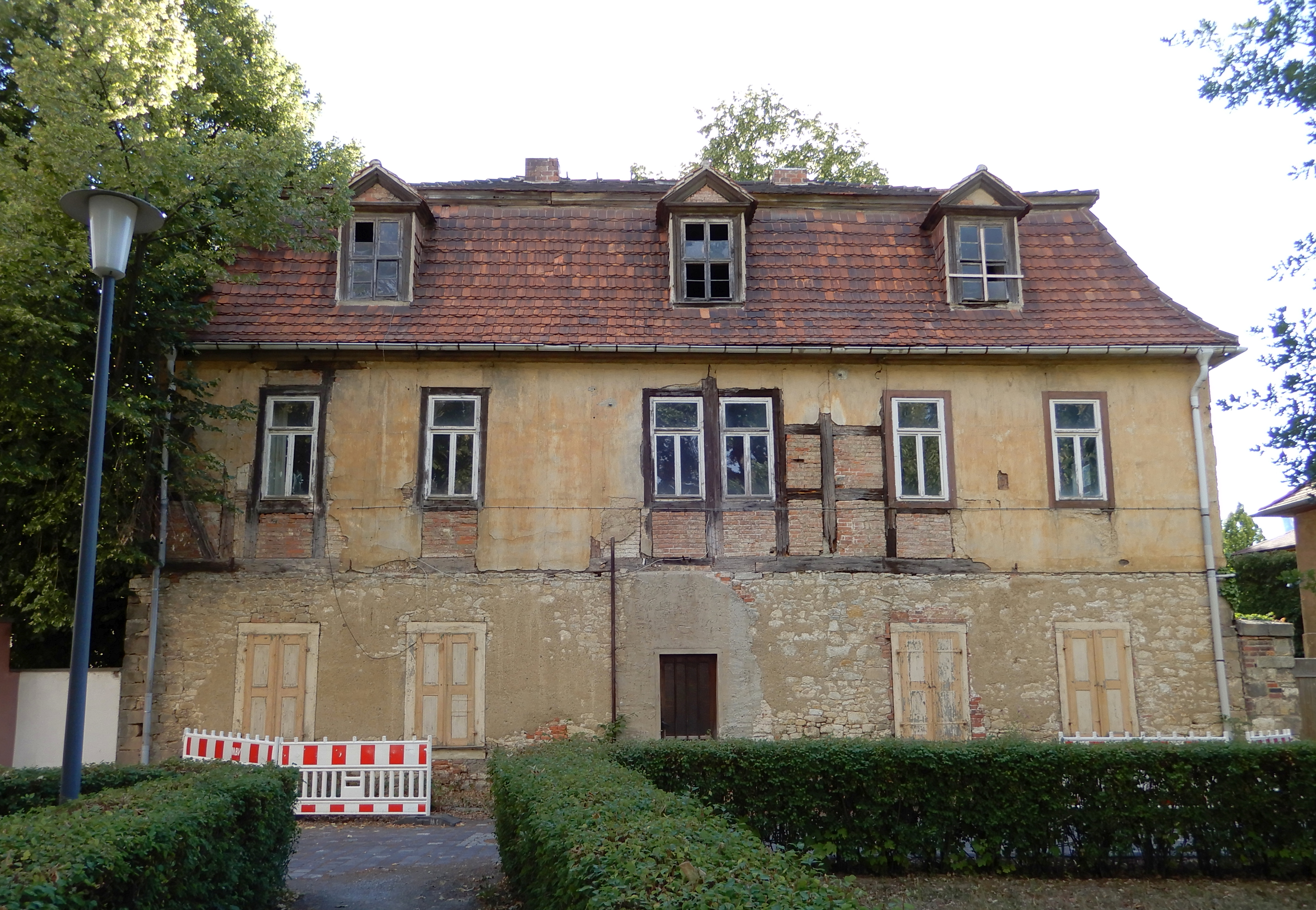 Verwaltungsgebäude Alte Post